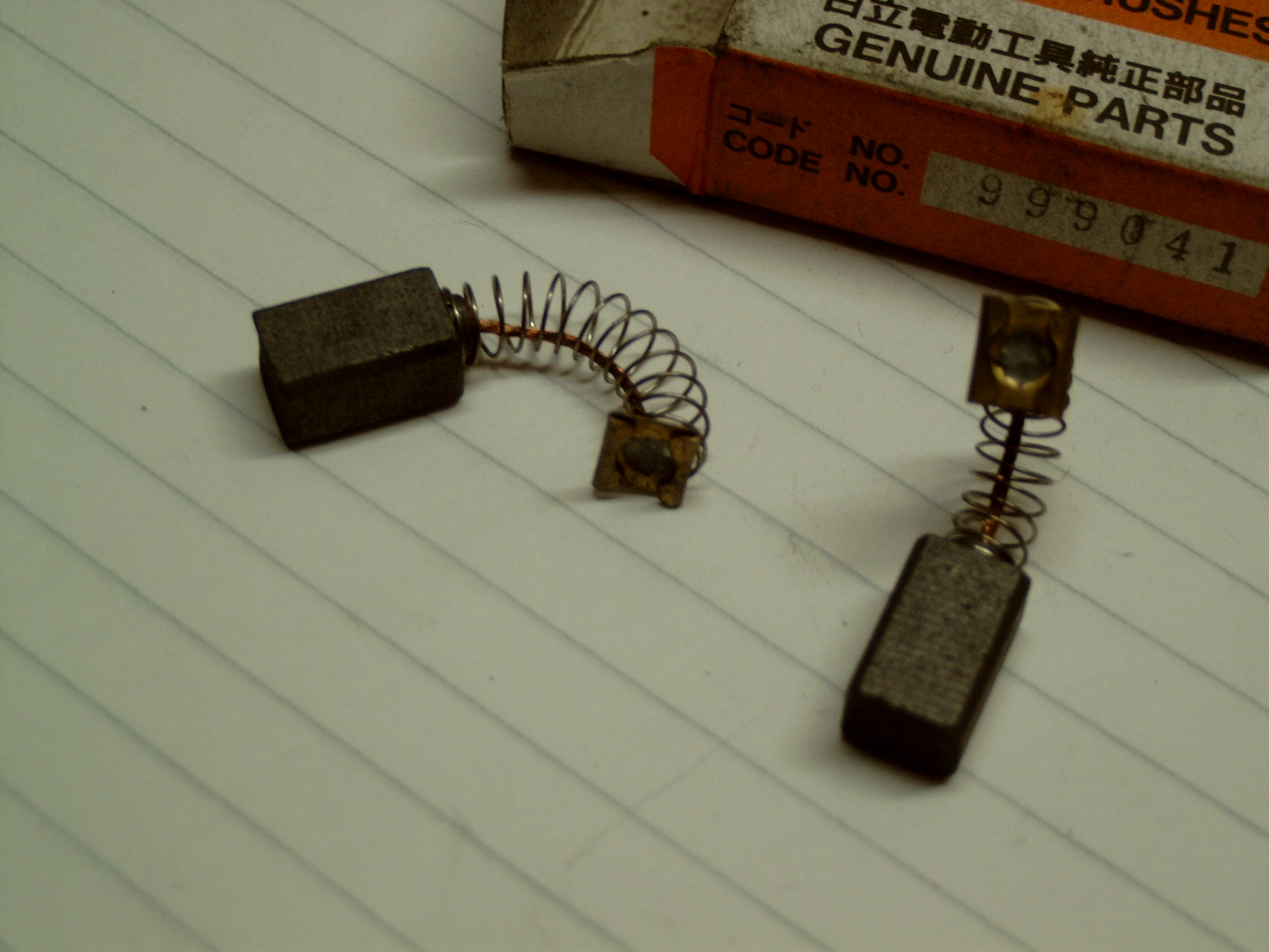 Koolborstels